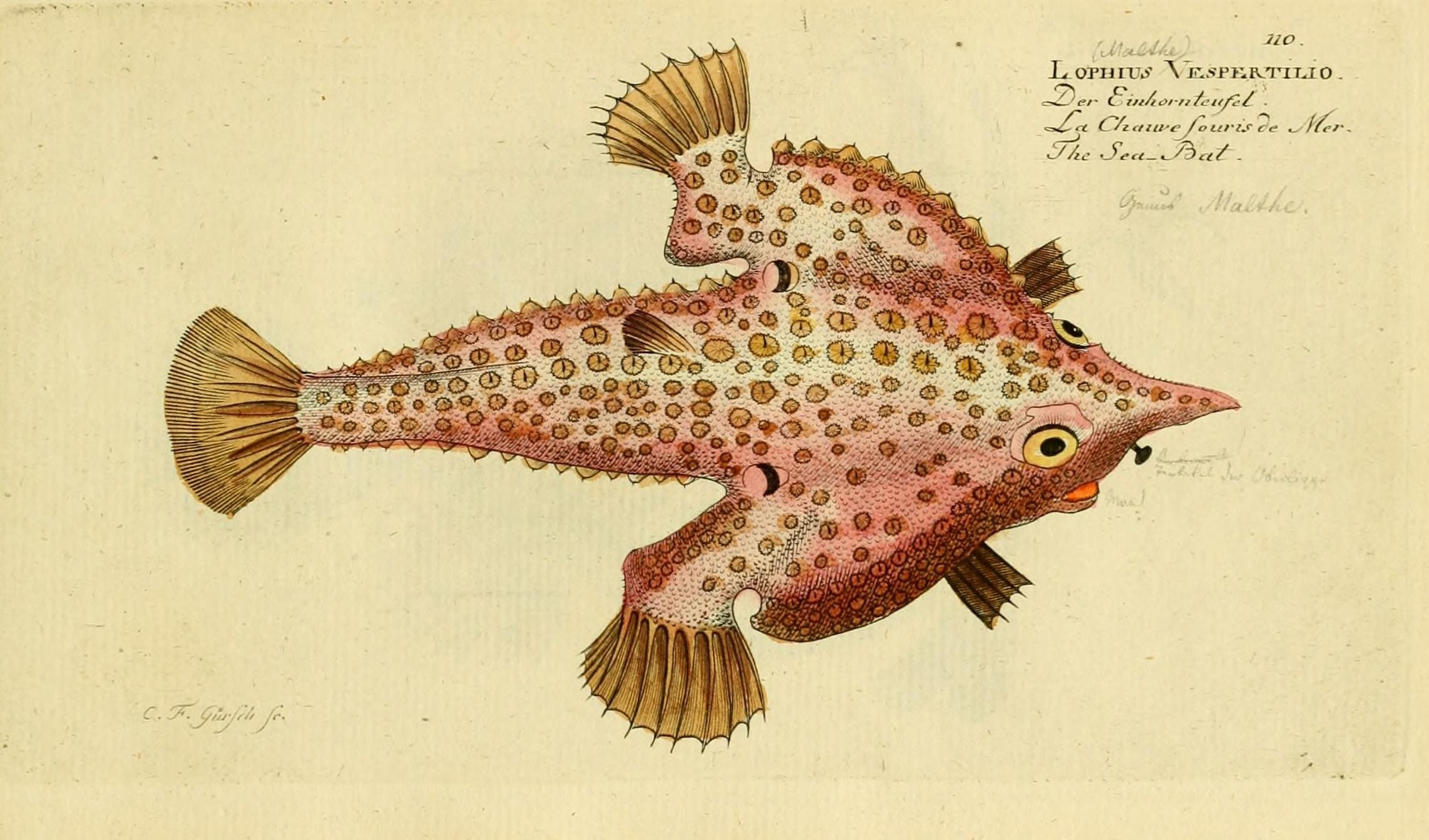 L OTU ras \ j&«f kr-tili o . o© -o. o o -. ."' ° .$œ. o JIM ©s; ff#s§«fi o